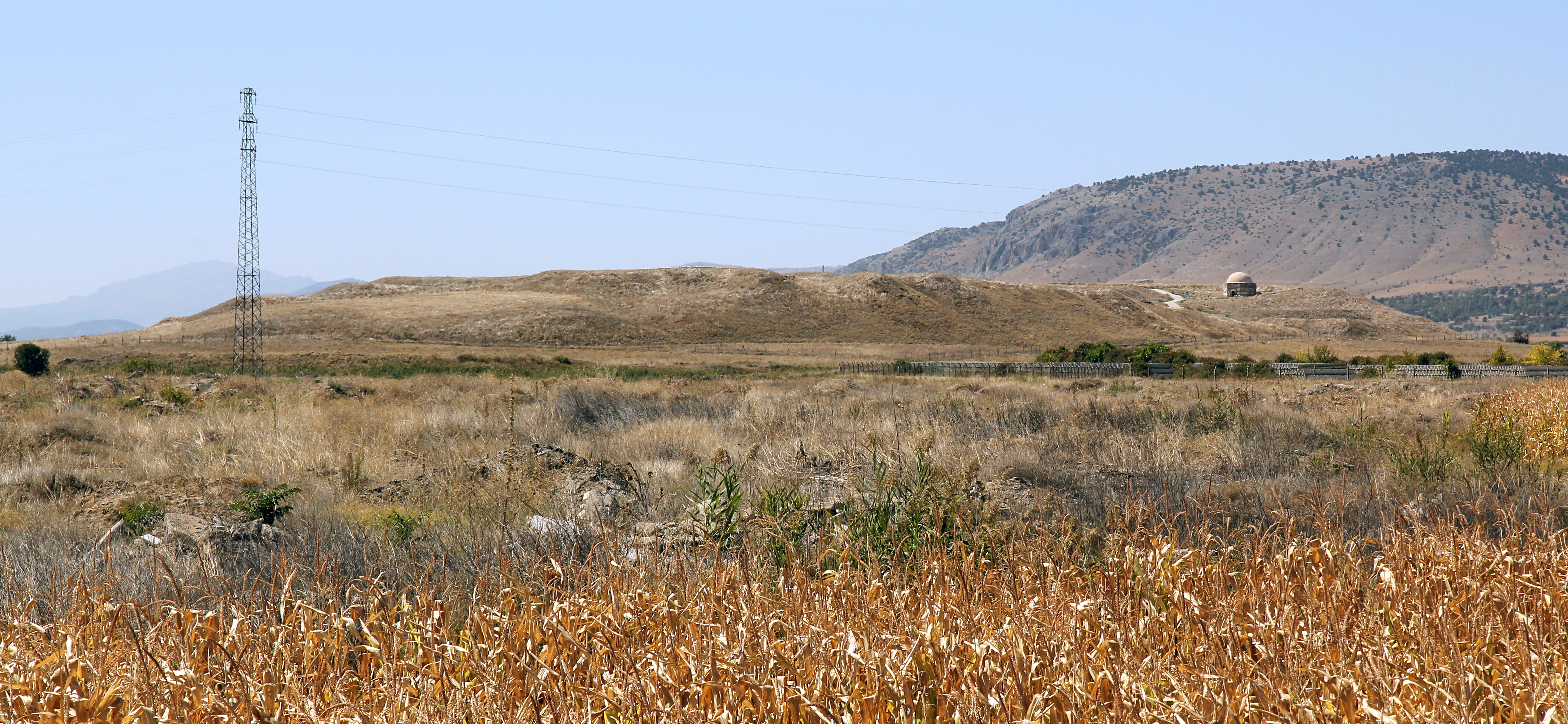 Beycesultan, Siedlungshügel bei Çivril in der westtürkischen Provinz Denizli